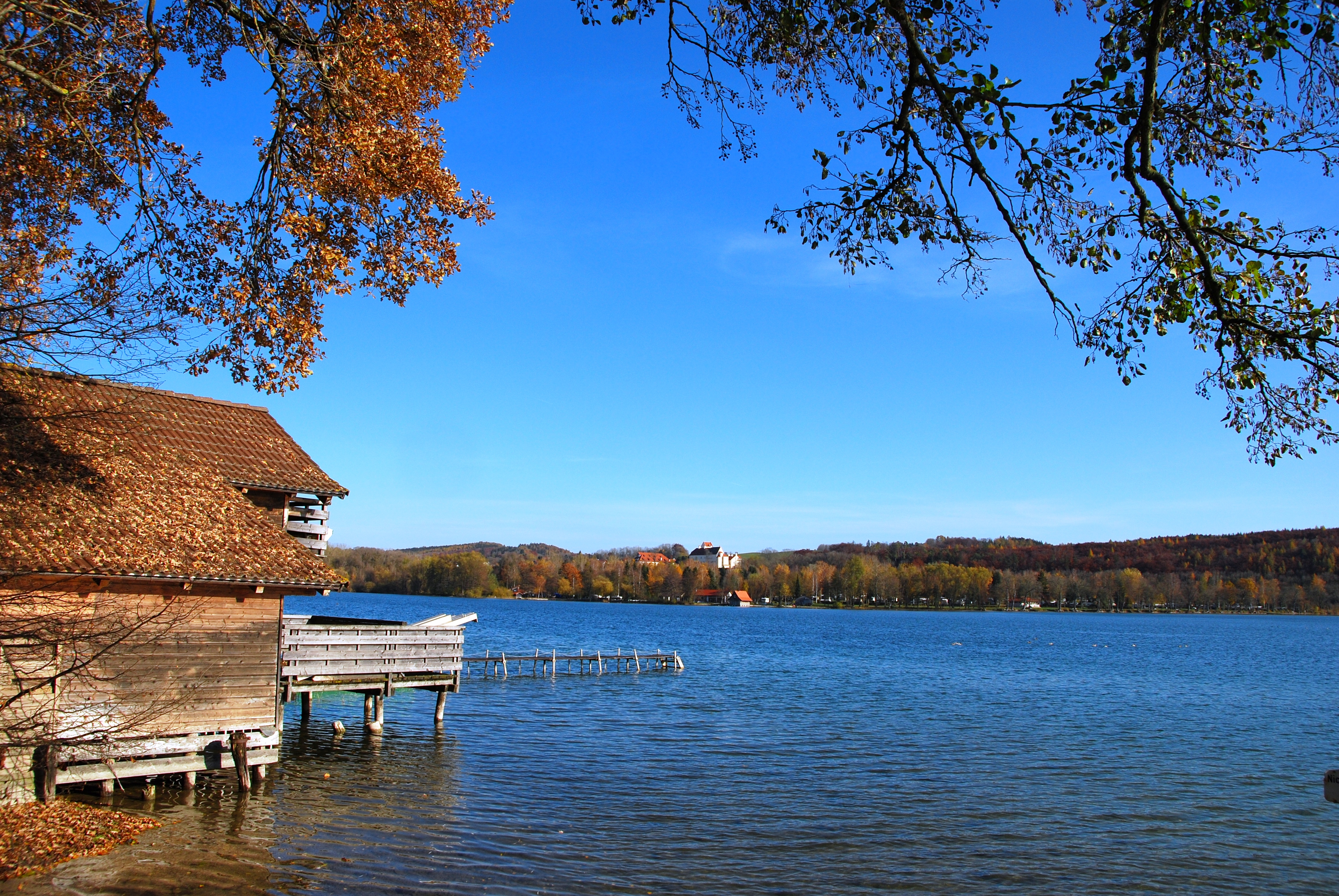 Seefeld, OT Hechendorf, Pilsensee mit Blick auf das am Ostufer des Sees liegende Schloss Seefeld.